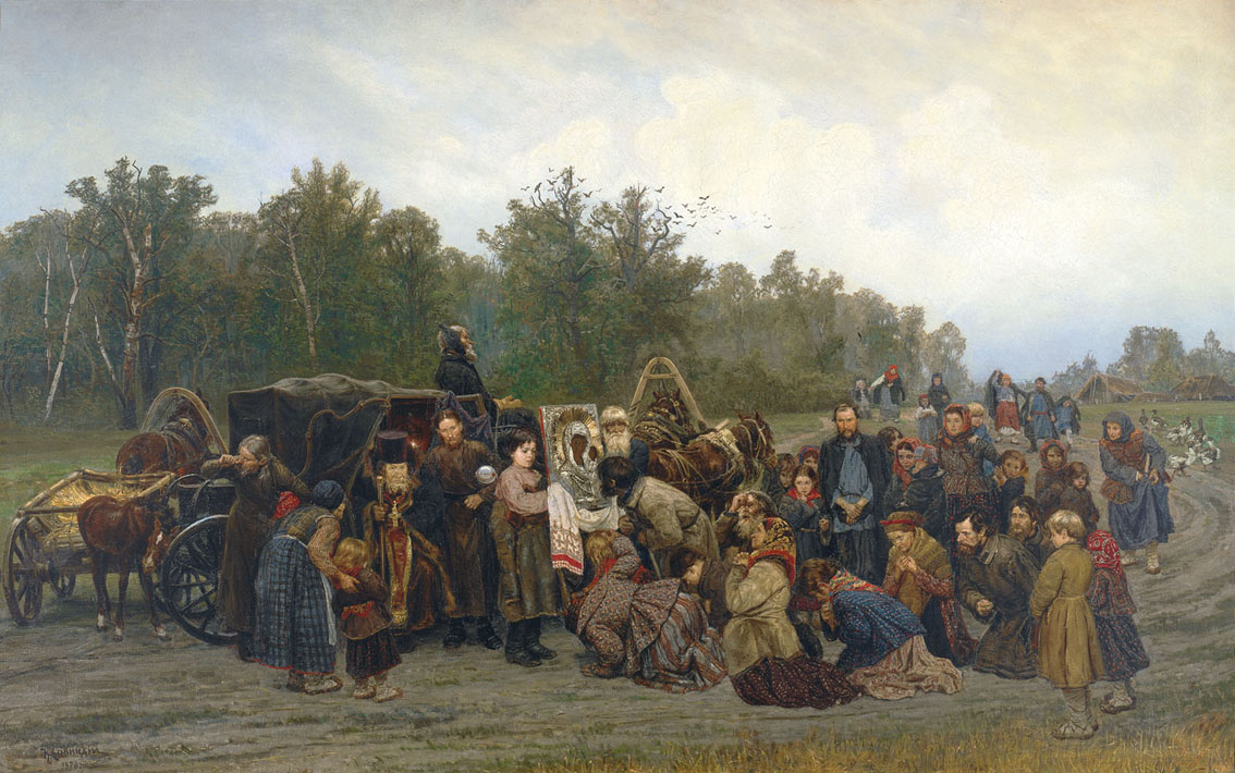 К. А. Савицкий. «Встреча иконы». 1878. Холст, масло. 144 × 230 см. Инв. 591. Третьяковская галерея, Москва, Россия.